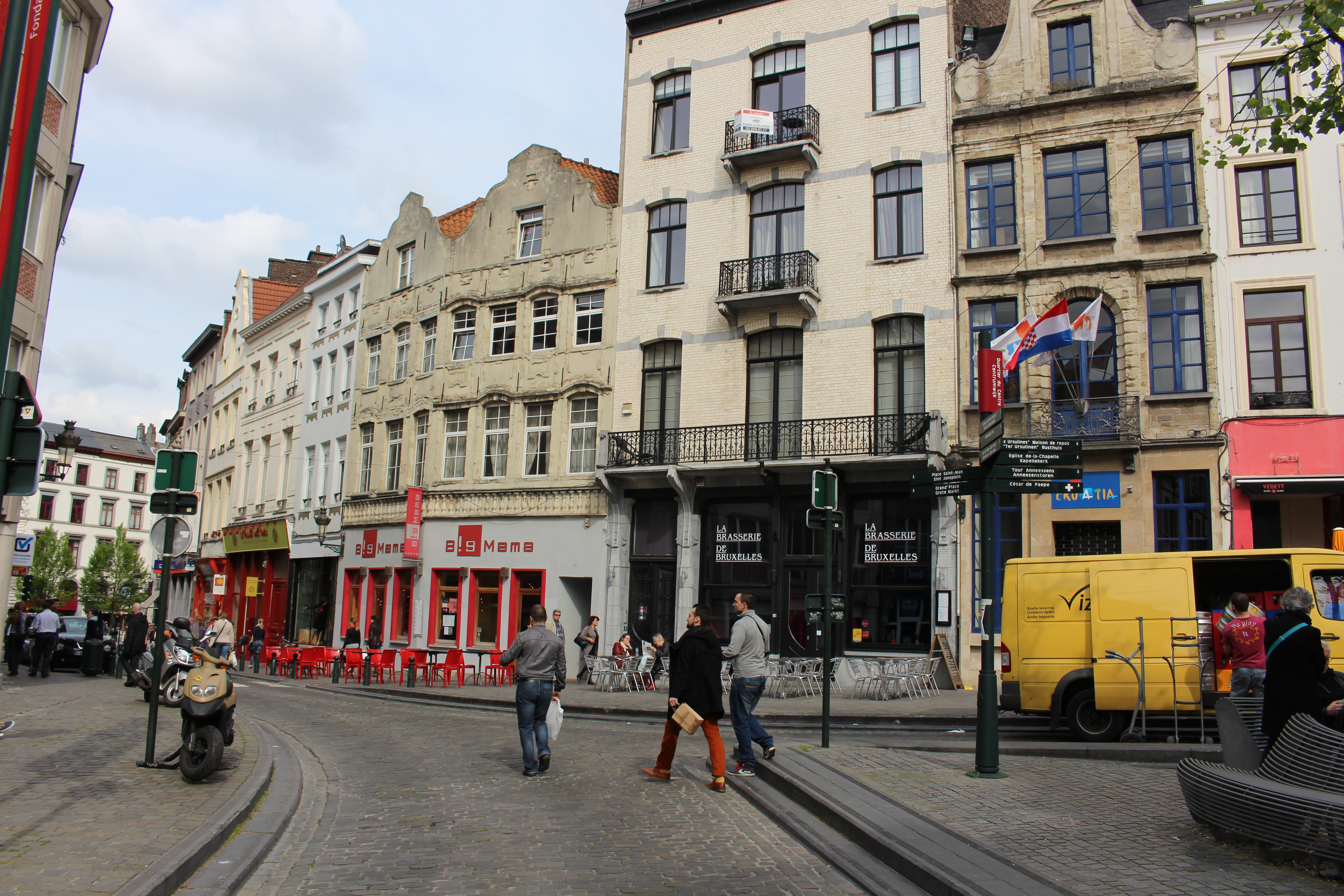 Place de la Vieille Halle aux Bles, Oud Korenhuis